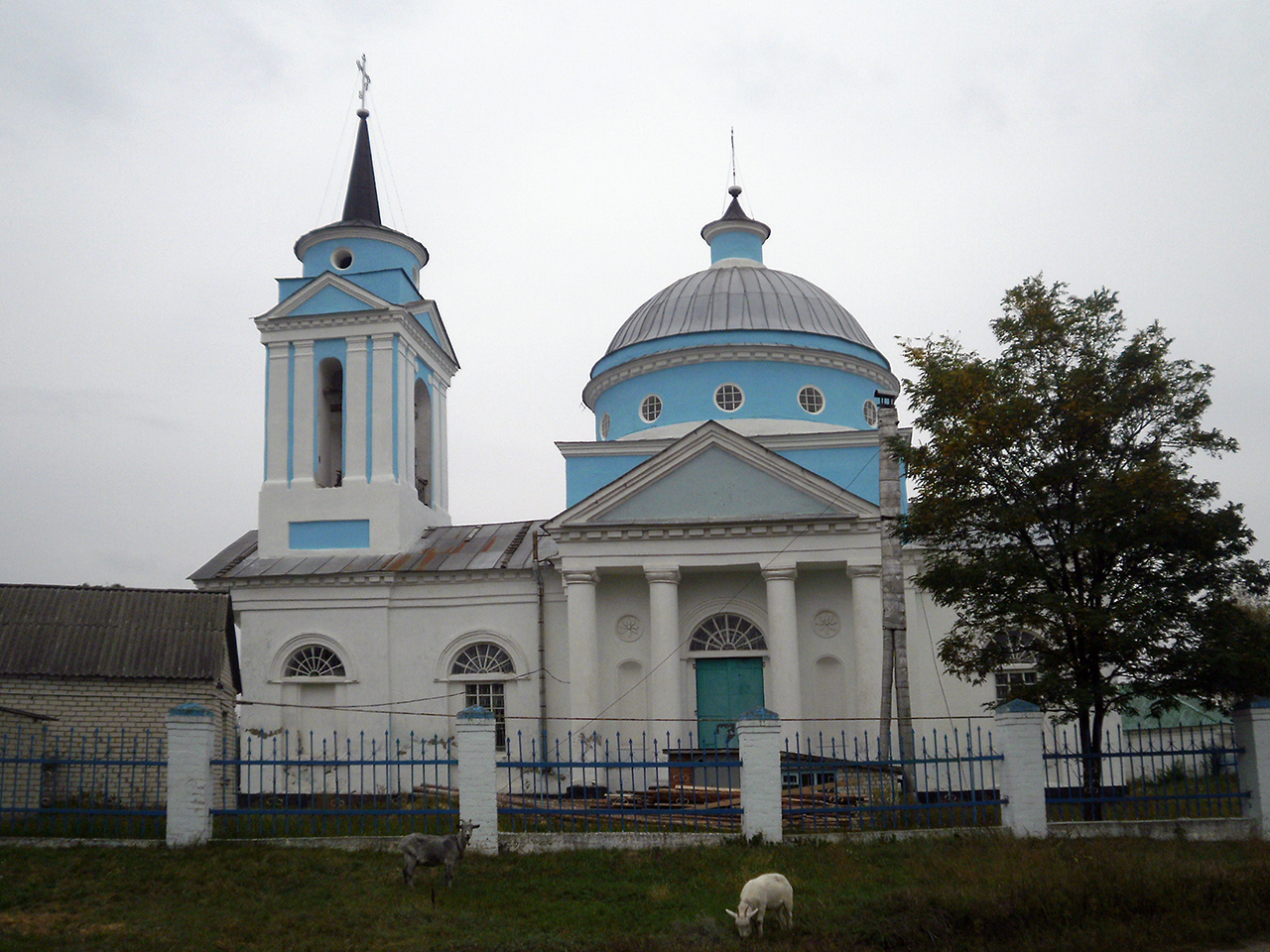 с. Капитоловка, Изюмский район